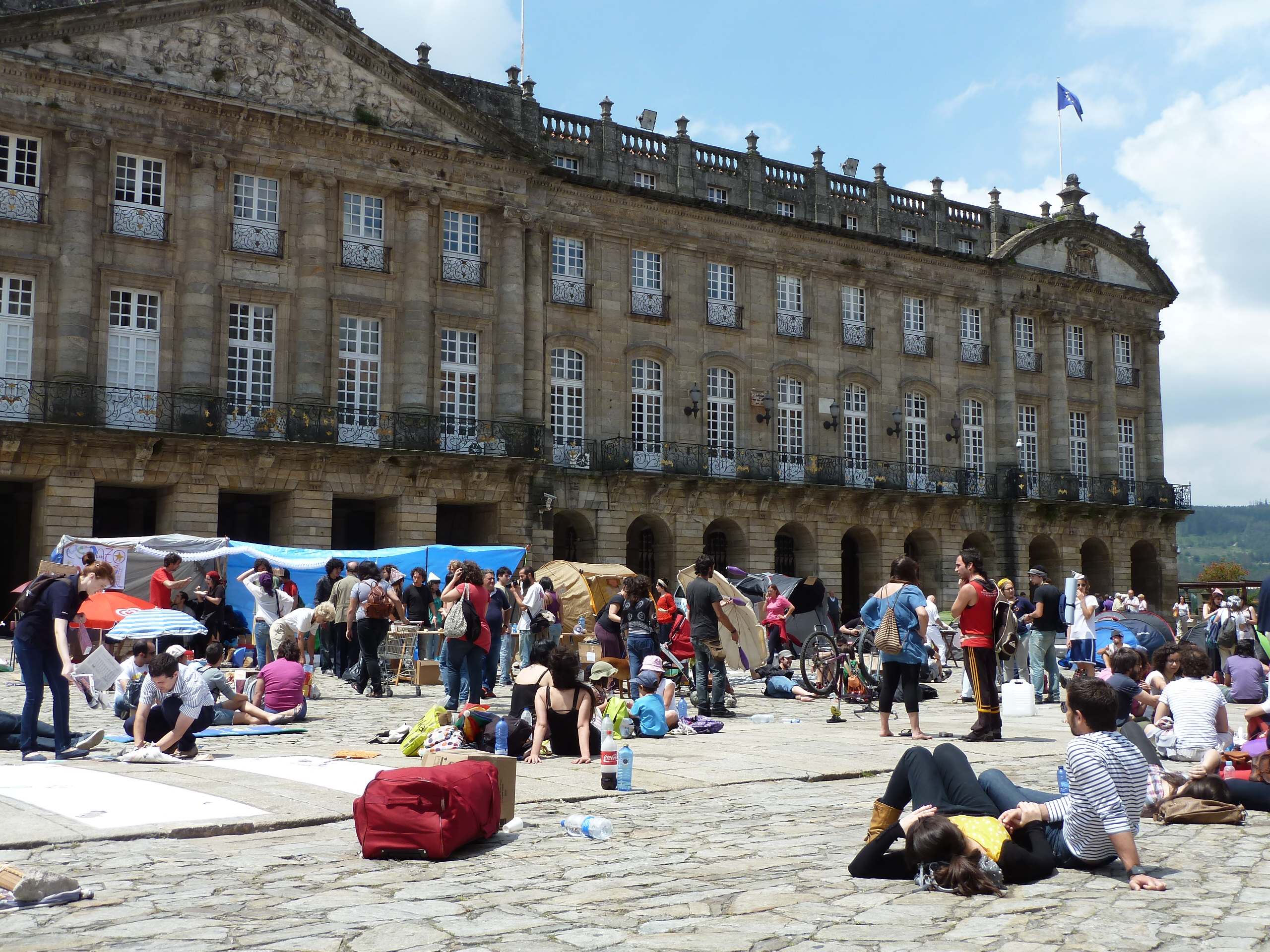 Spanish Revolution na plaza do Obradoiro, Santiago de Compostela.